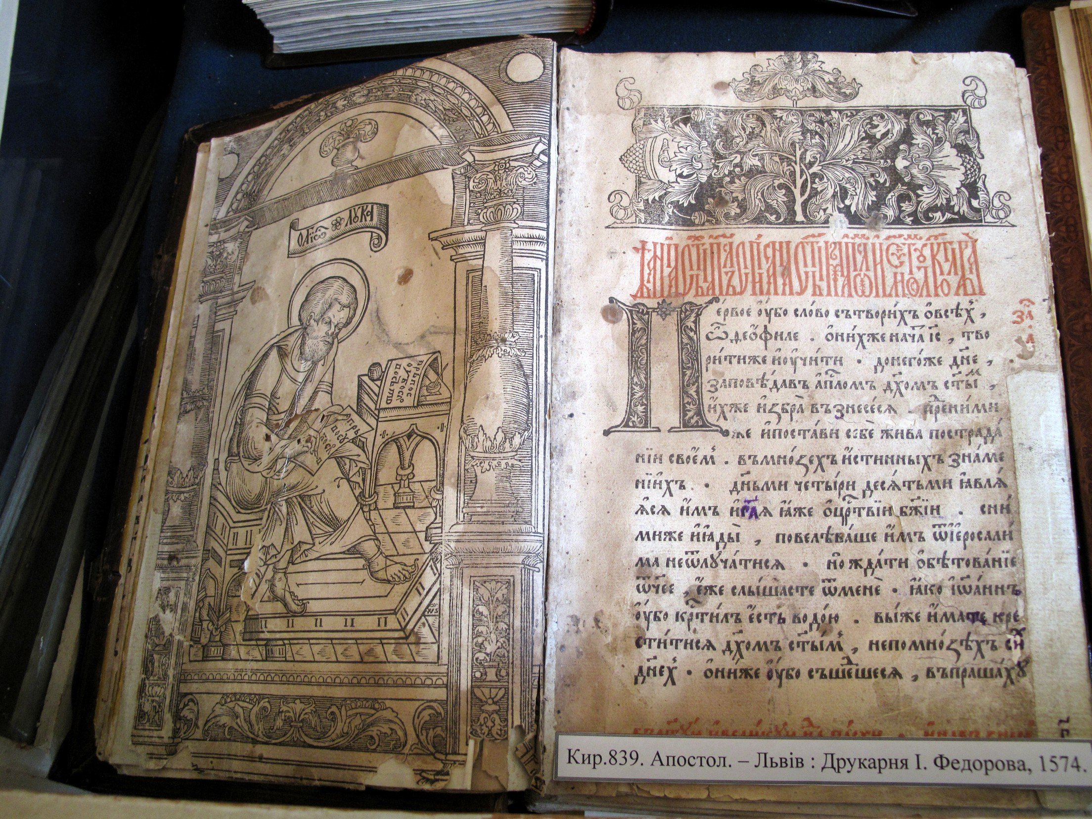 Апостол. 1674 р.